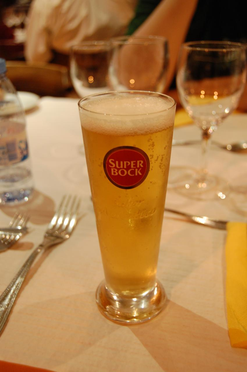 Super Bock